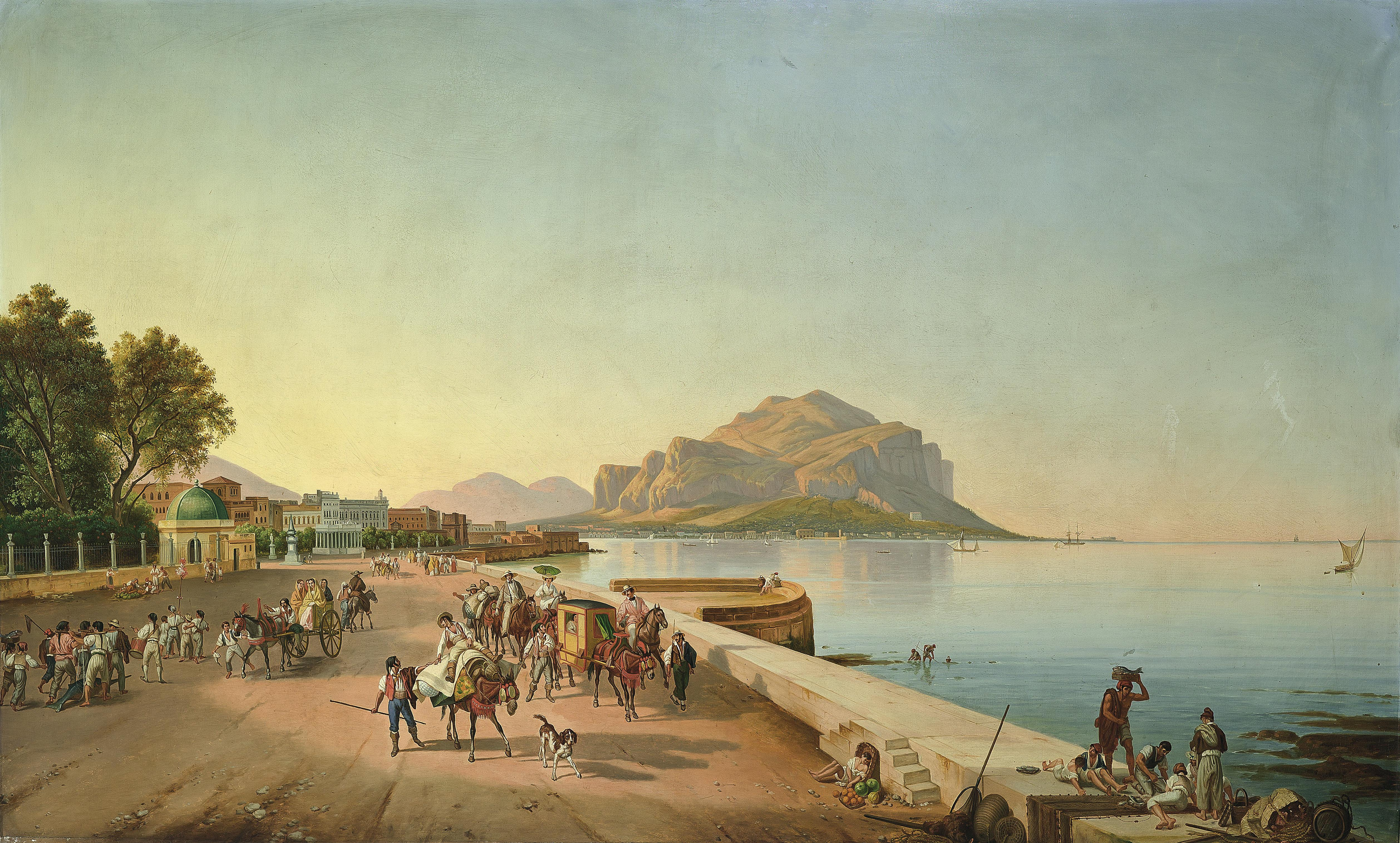 Spaziergang in Palermo wohl Zarin Alexandra Fjodorowna in der Sänfte, begleitet von Großfürstin Olga Nikolajewna, deren Verlobten Prinz Karl Friedrich Alexander von Württemberg und Großfürst Konstantin Nikolajewitsch zu Pferd, im Hintergrund der Monte Pellegrino